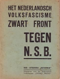 Het Nederlandsch Volksfascisme Zwart Front tegen NSB.